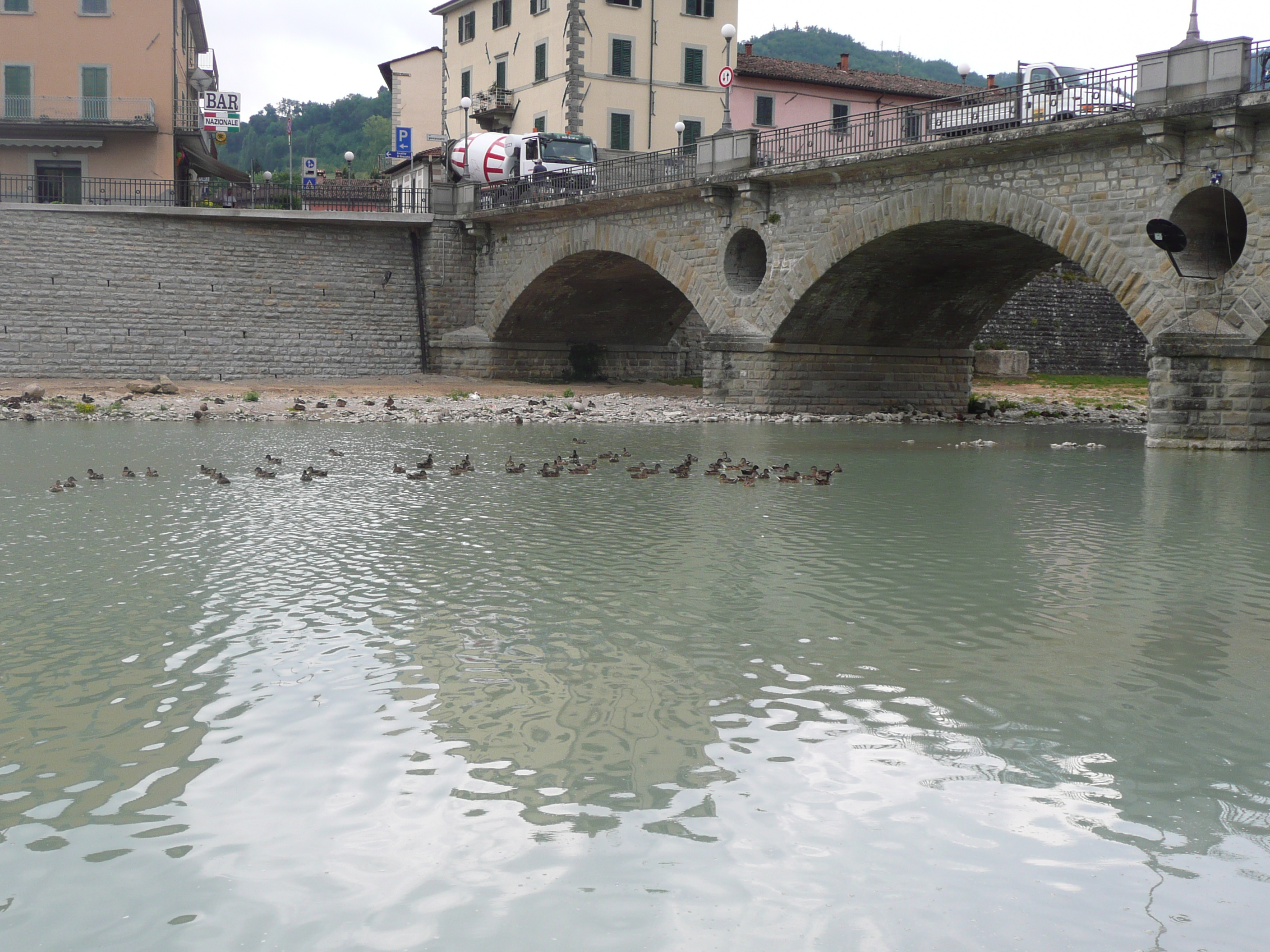 Ponte vecchio e Fiume Bidente This is a photo of a monument which is part of cultural heritage of Italy.